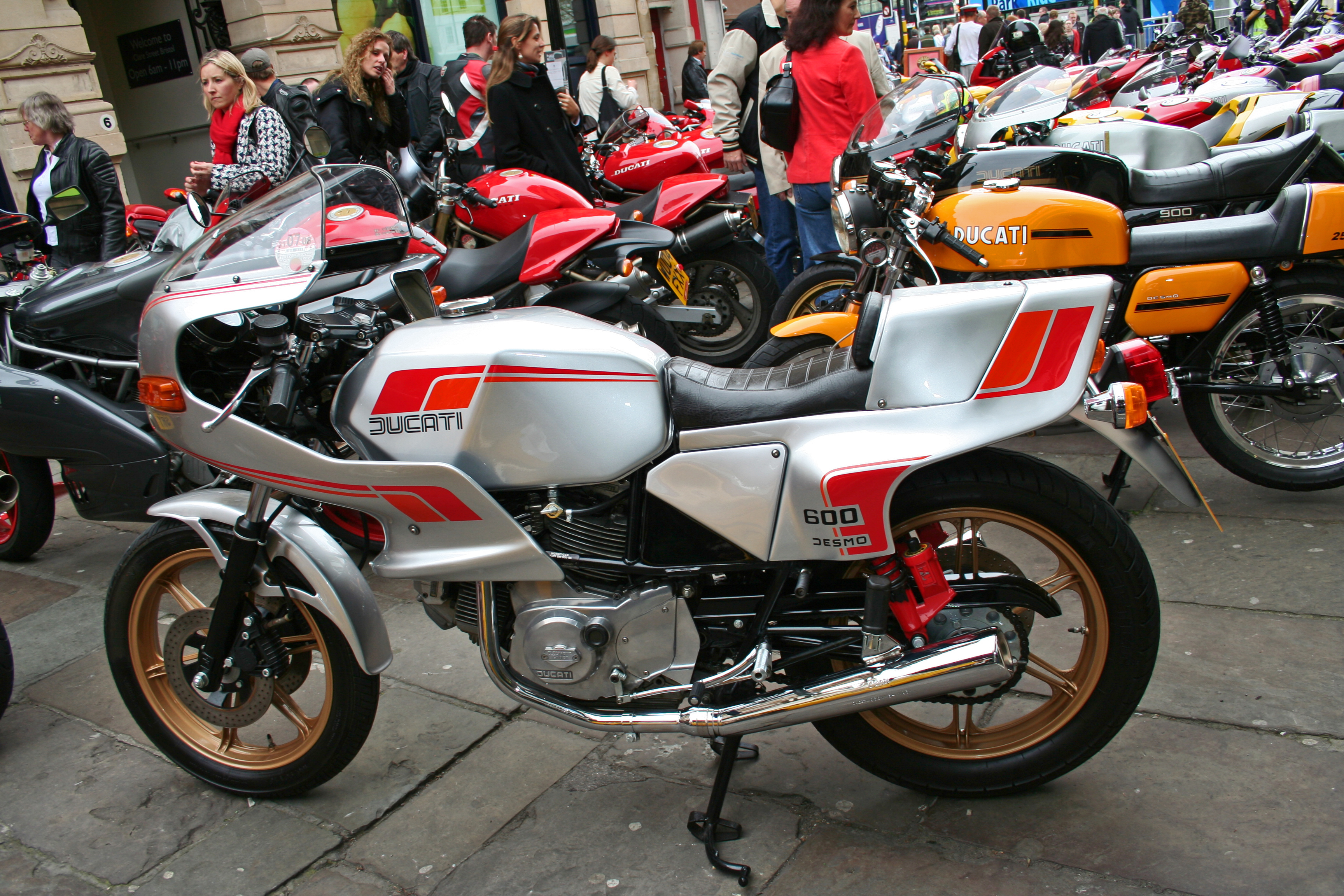 Bristol Italian Auto Moto Festival 2008